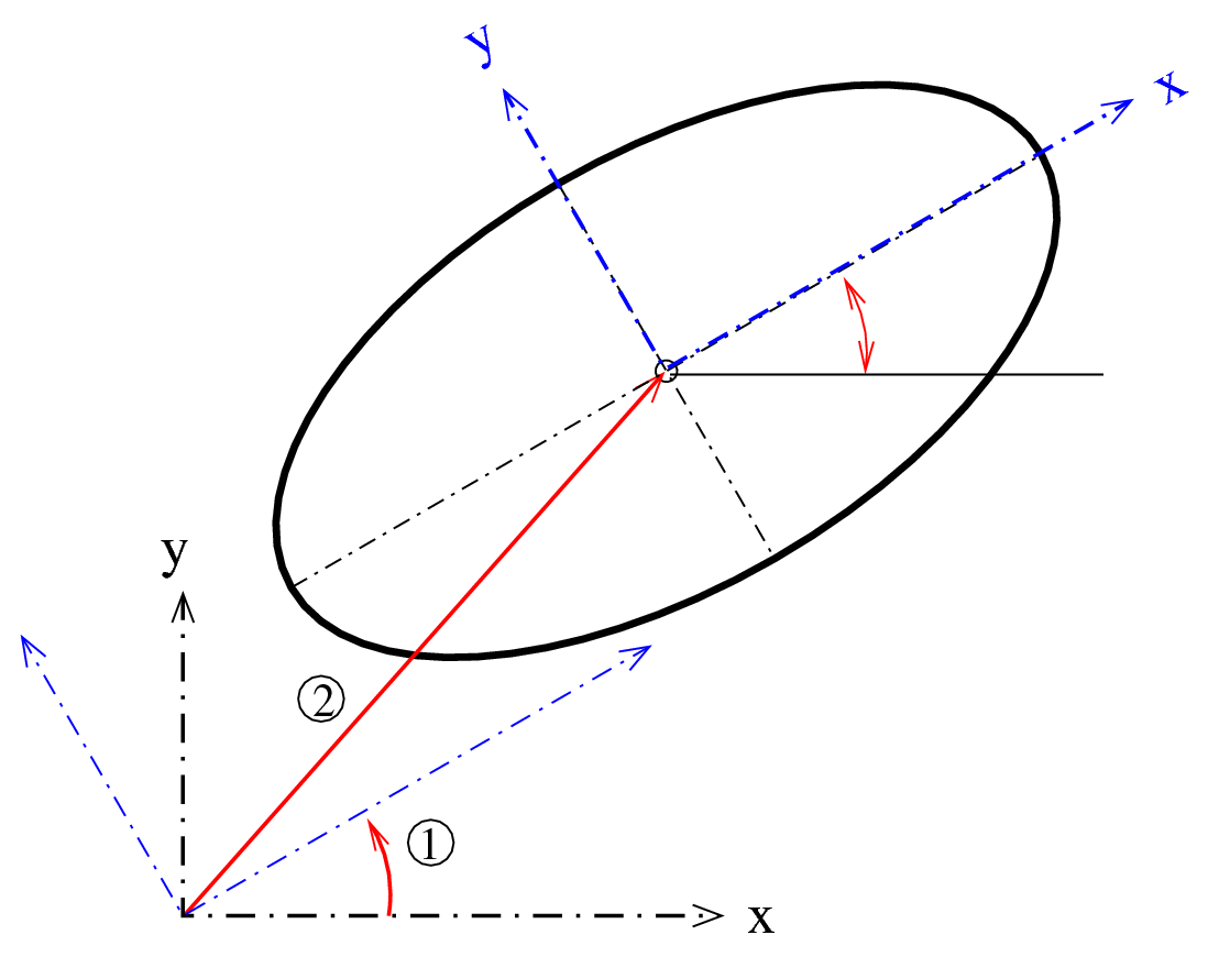 Ellipse: Hauptachsentransformation